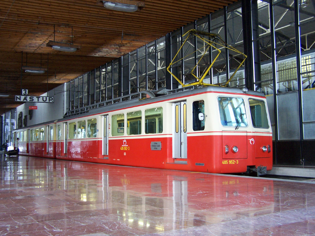 Ozubnicová železnica Štrba-Štrbské Pleso